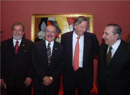 20 años del Mercosur. Lula, Sarney, Kirchner, Alfonsín.